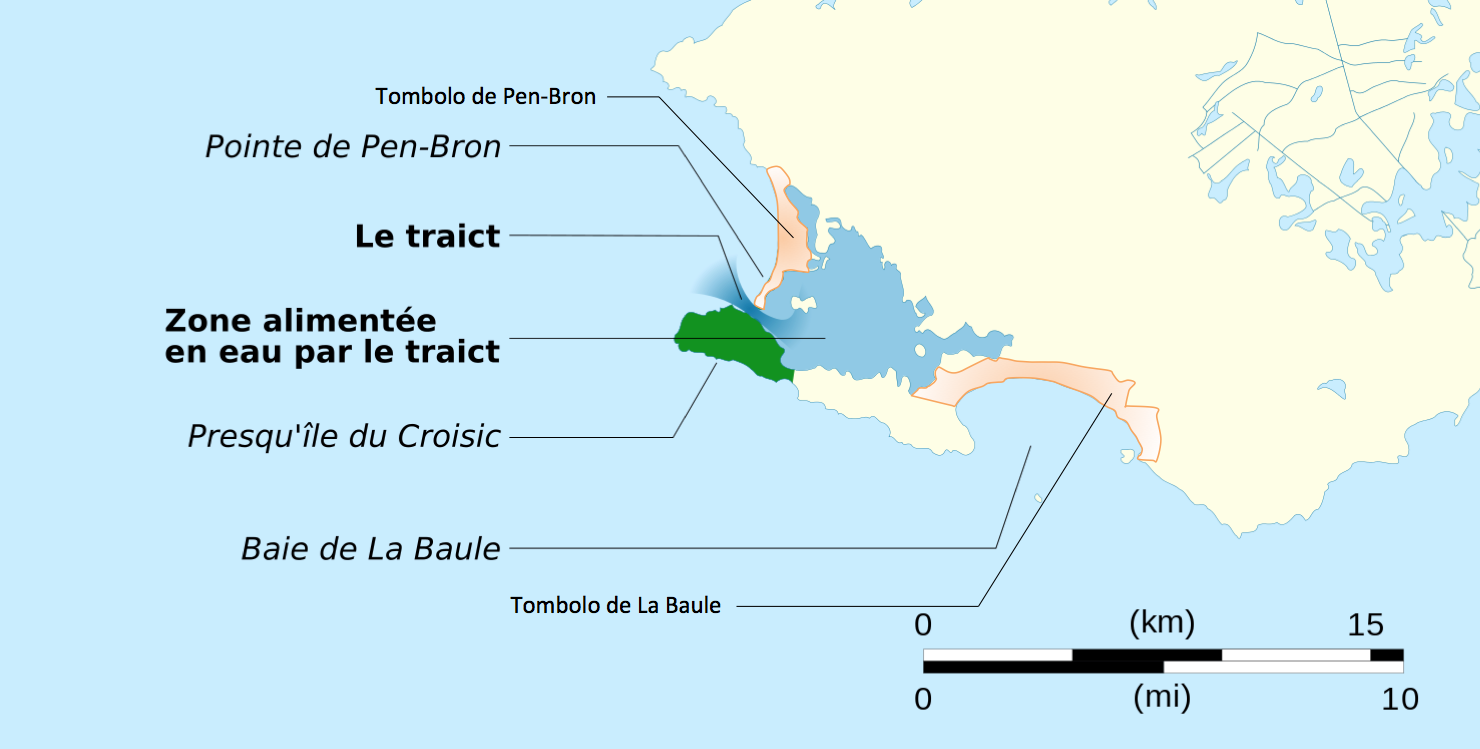 Les tombolos de la presqu'île du Croisic